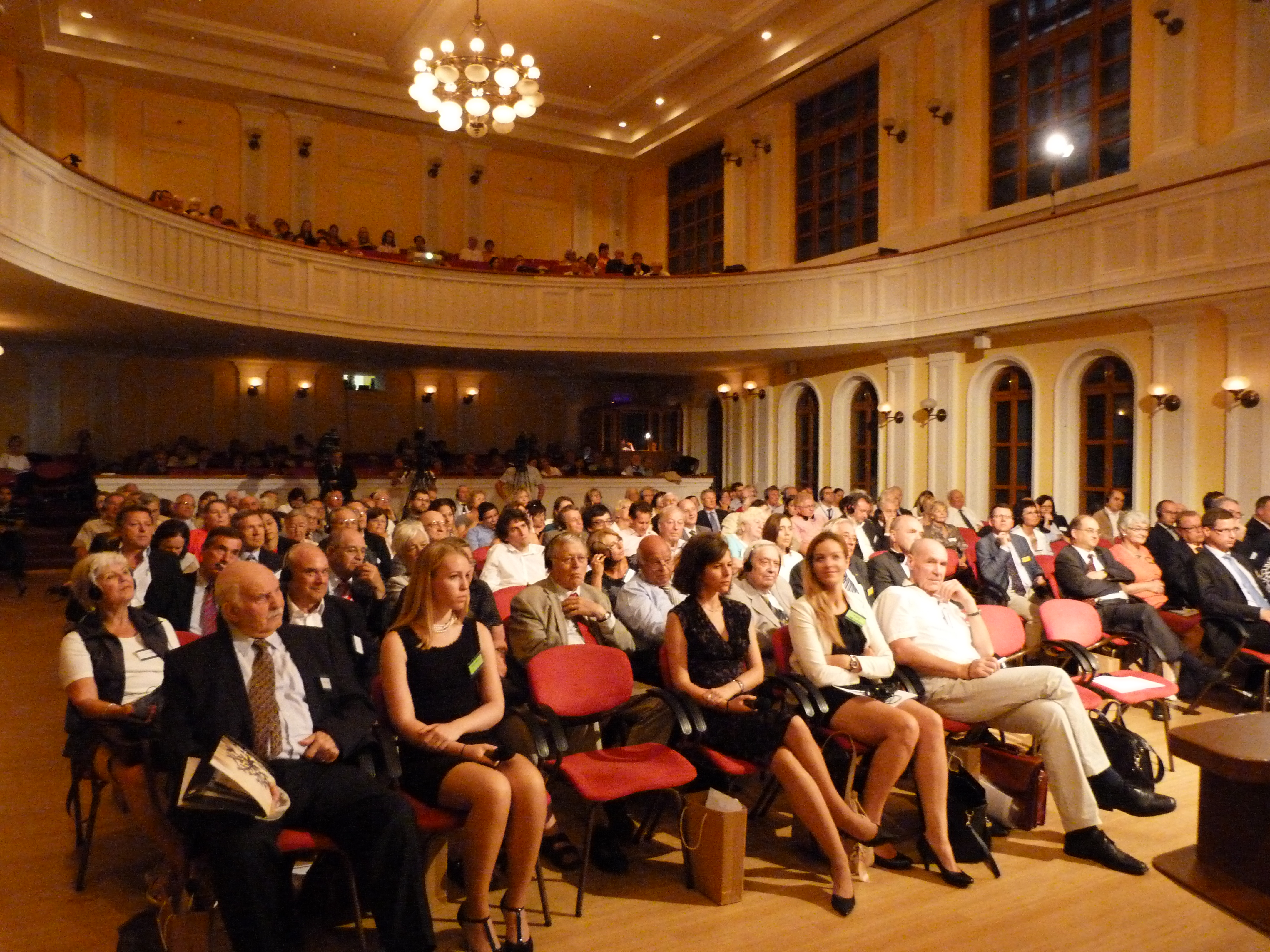 A felvétel 2014. augusztus 18-án, hétfőn készült Sopronban. Kapu a szabad Európa felé. 25 éves a Páneurópai Piknik. Konferenciát szervezett a Polgári Magyarországért Alapítvány a Konrad Adenauer Alapítvánnyal, az Antall József Tudásközponttal, a Páneurópai Piknik '89 Alapítvánnyal, Sopron Városával. Dr. Fodor Tamás, Sopron Város Polgármestere, Magas László Páneurópai Piknik '89 Alapítvány Elnöke, Antall Péter az Antall József Tudásközpont igazgatója, Frank Spengler a Konrad Adenauer Alapítvány magyarországi képviseletének vezetője, Gulyás Gergely országgyűlési képviselő, a magyar Országgyűlés alelnöke, Hildigung Neubert a Thüringiai Miniszterelnökség államtitkára. Panel: Filep Mária Magyar Demokrata Fórum, Debrecen (1989), Nagy László Soproni Magyar Demokrata Fórum (1989), Balla Árpád, határőrparancsnok a helyszínen, Kozma Imre Magyar Máltai Szeretetszolgálat, Liszt Ferenc Központ